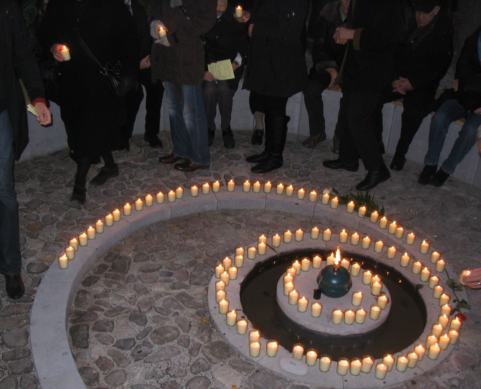 „Trauerort“ für Flüchtlinge in Düsseldorf. 20. November 2011 (Totensonntag), während der Eröffnungsfeier des Trauerortes. Im Hof der Berger Kirche: Brunnen aus belgischem Blaustein, umrahmt von einem Bambushain. Entwurf Anne Mommertz.